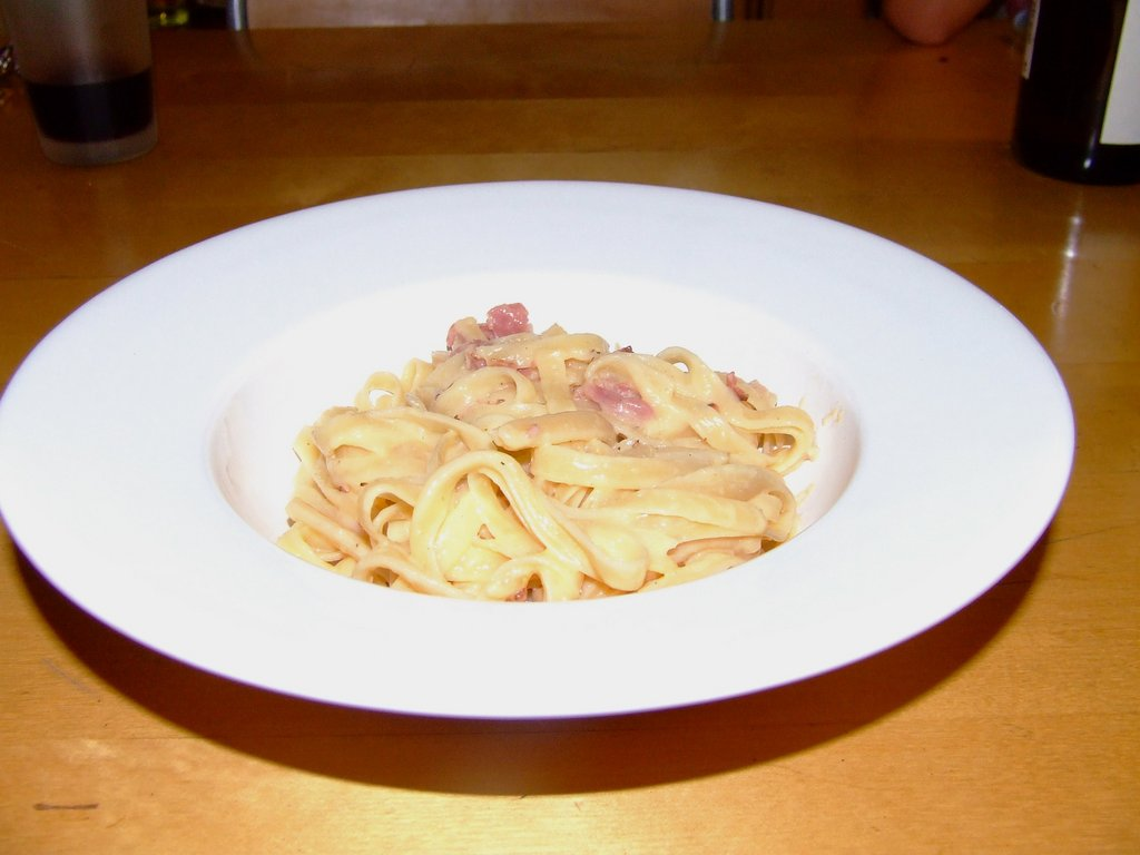 Pasta Carbonara